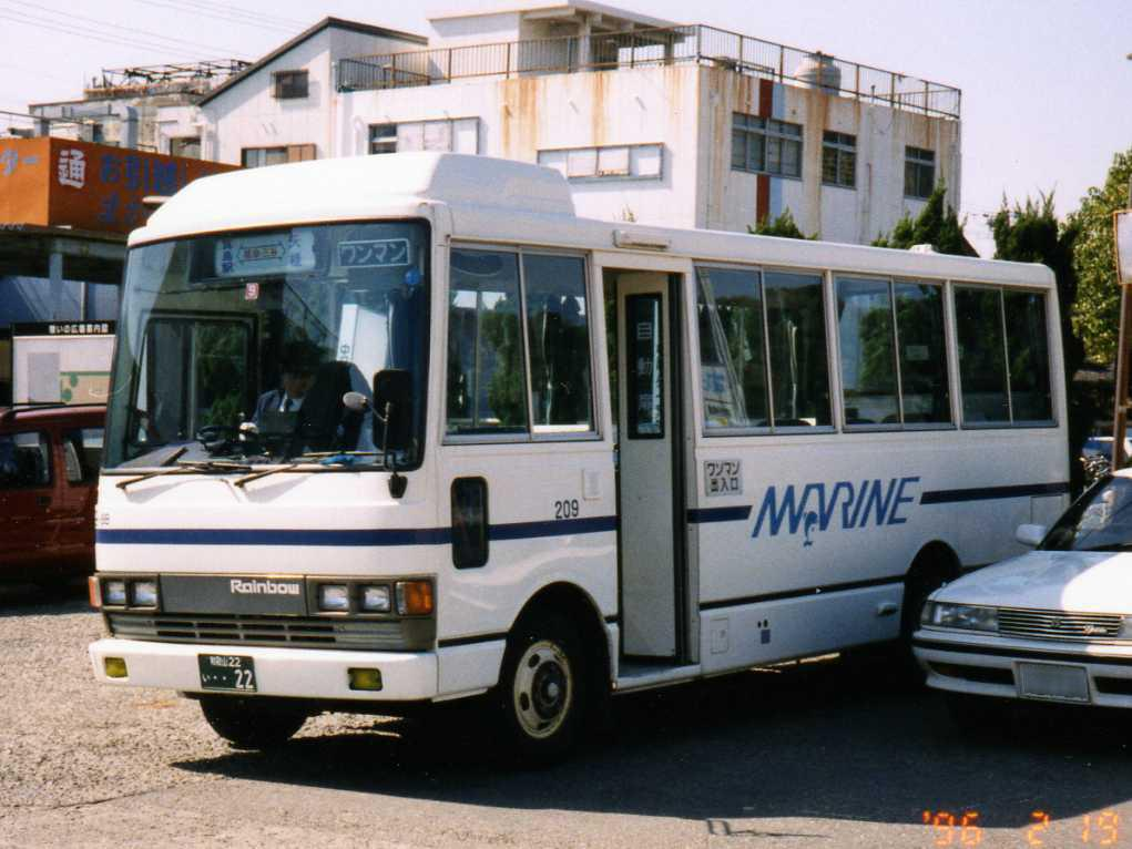 Chuki Bus Hino Rainbow at Kii-Mishima Sta.